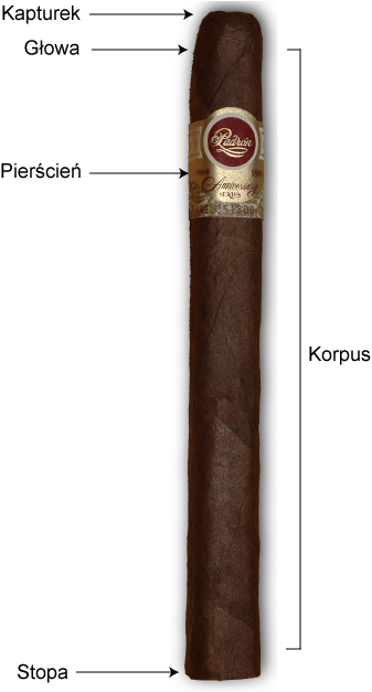 Budowa cygara. Cygaro marki Jose Padrón, Anniversary 1964 maduro; vitola: Churchill; kraj pochodzenia: Nikaragua.